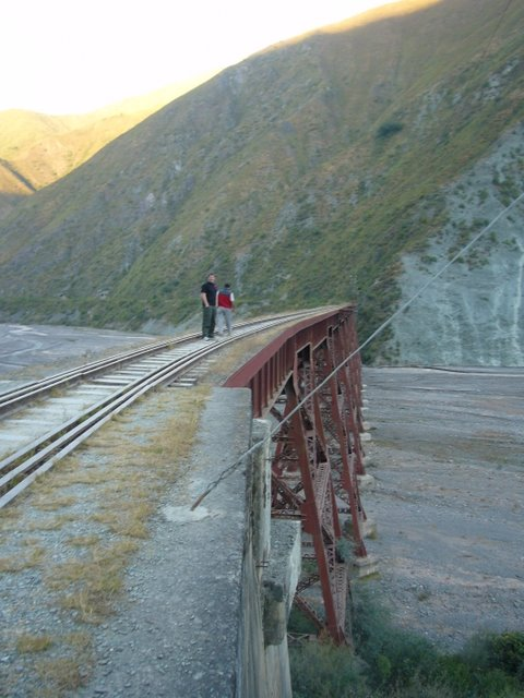 Viaducto del Toro, Salta (Argentina)